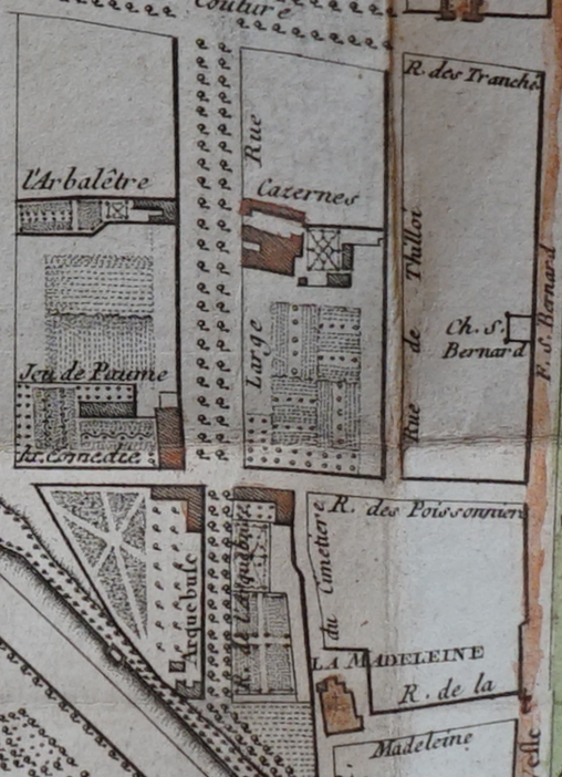 dessin de Povillon pierard issue du maniscrit de la meme main.